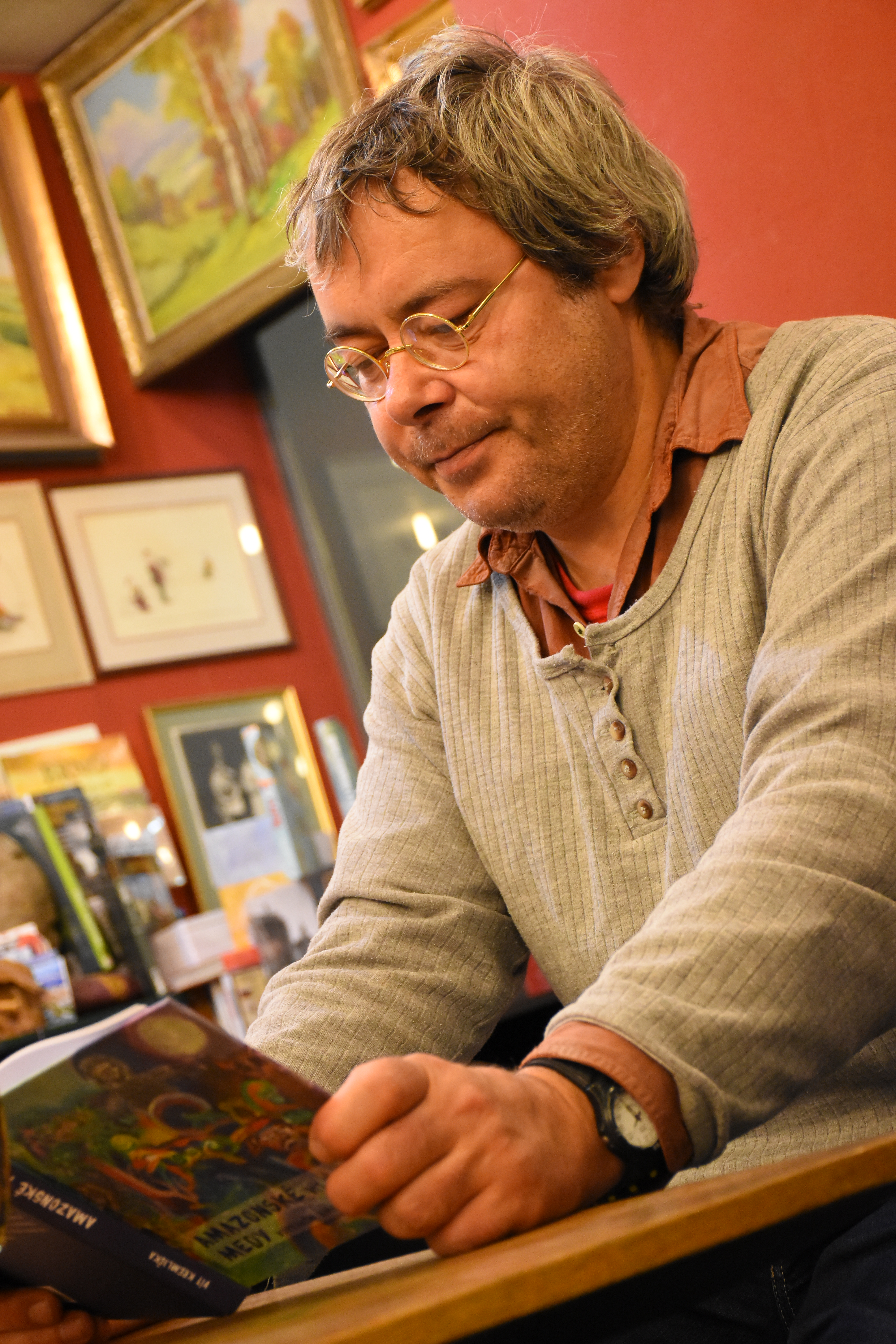 Vít Kremlička, autorské čtení u Ženíška v Brně